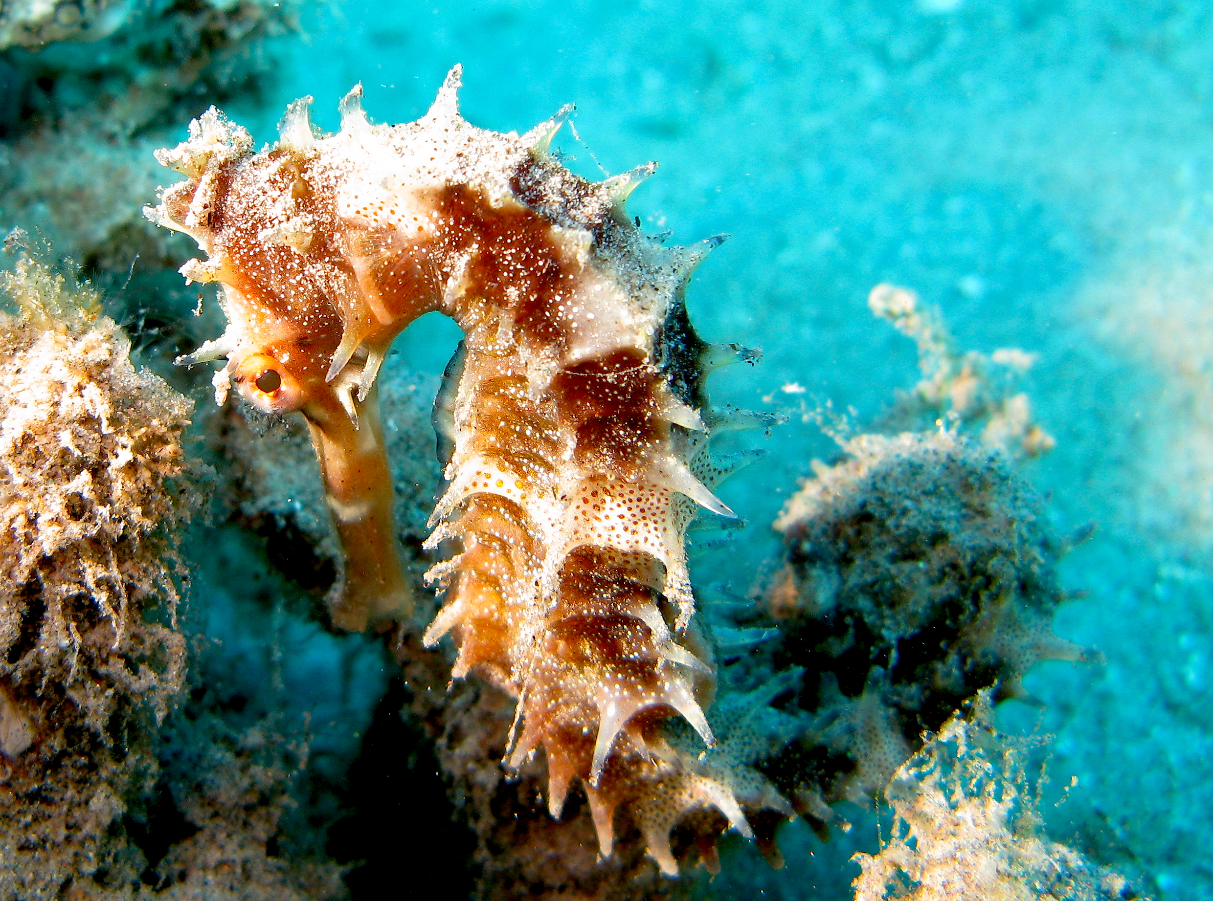 Hippocampus jayakari, Egipto